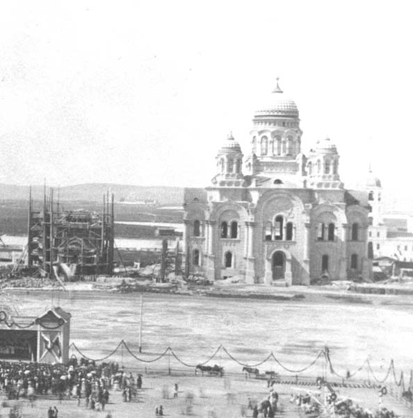 г. Иркутск. Тихвинская площадь Кафедральный собор строится. Празднование прибытия в Иркутск наследника престола цесаревича Николая.